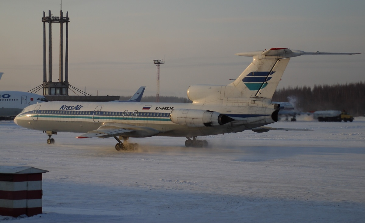 KrasAir Tupolev Tu-154B-2